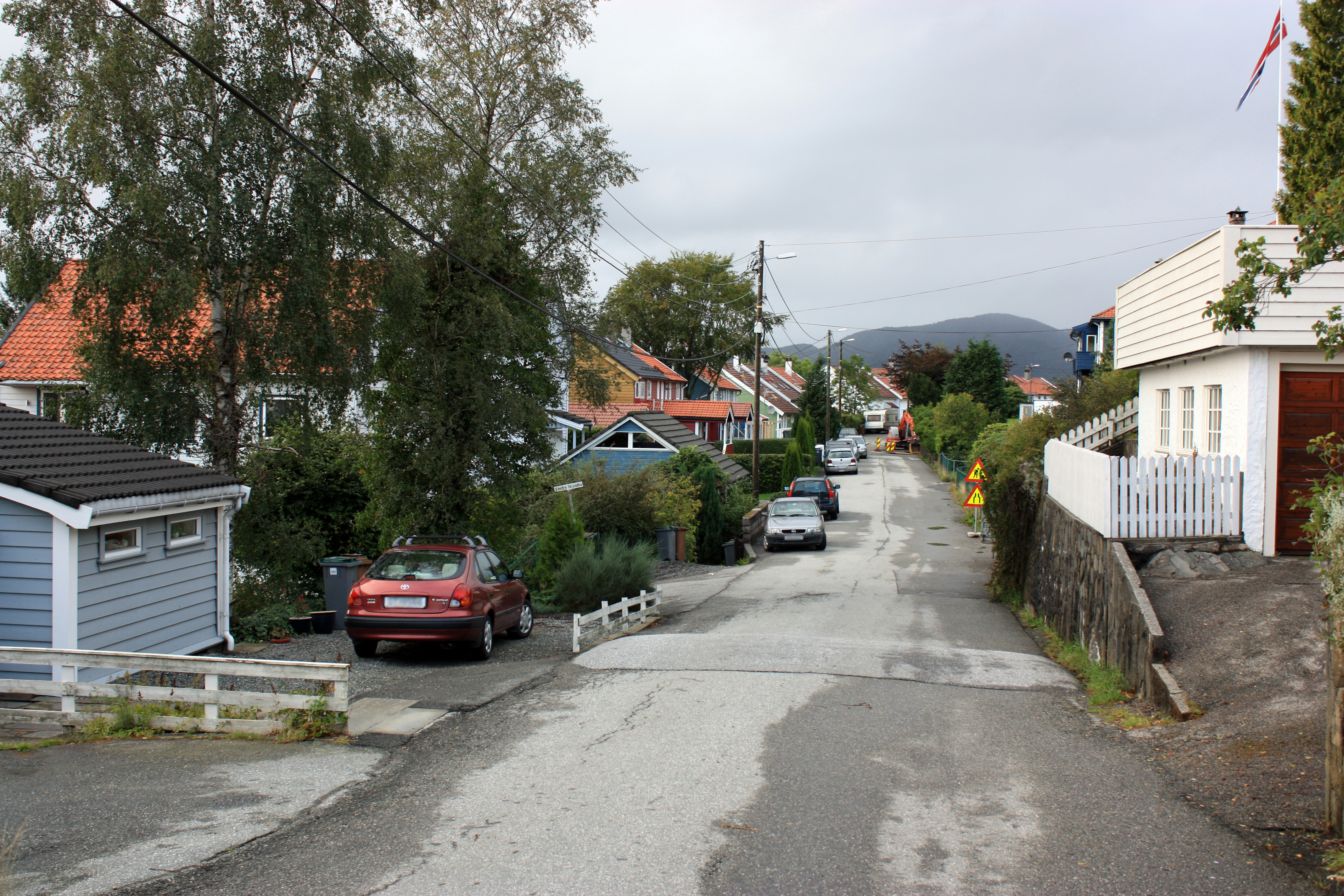 Skjoldlia, Fana, Bergen.